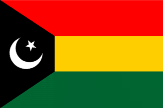 Bandera del Principado de Bahawalpur usada por el Pakistan Seraiki Party Imagen realizada por J. Ollé Véase también: Wikipedia:Autorizaciones/Banderas de Jaume Ollé Categoría:Banderas (imagen)